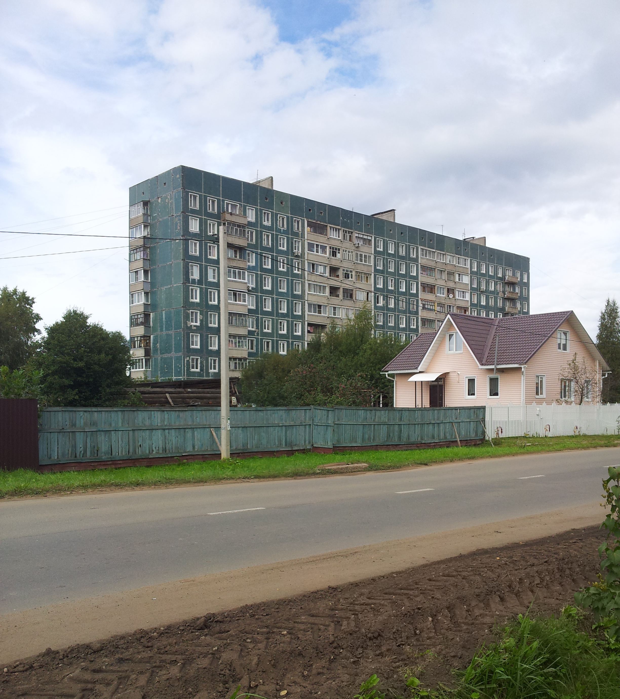 9-этажный жилой дом серии 1ЛГ-504Д2 в Рыбинске по адресу: ул. Гражданская, 49